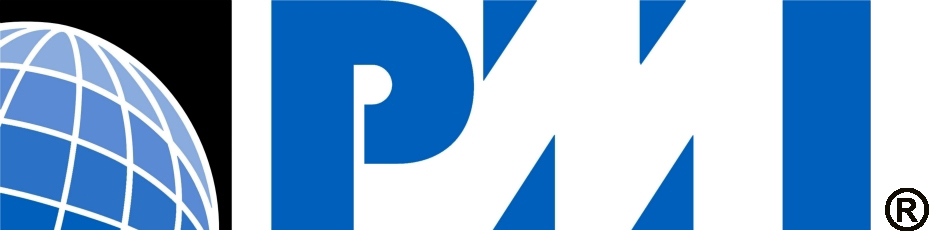 pmi